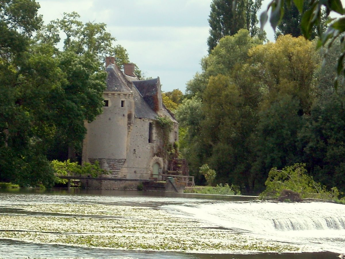 Moulin de Mervé - Seul moulin classé de Sarthe. Sur le Loir (rivière) à Luché-Pringé.